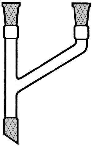 насадка «форштосс»